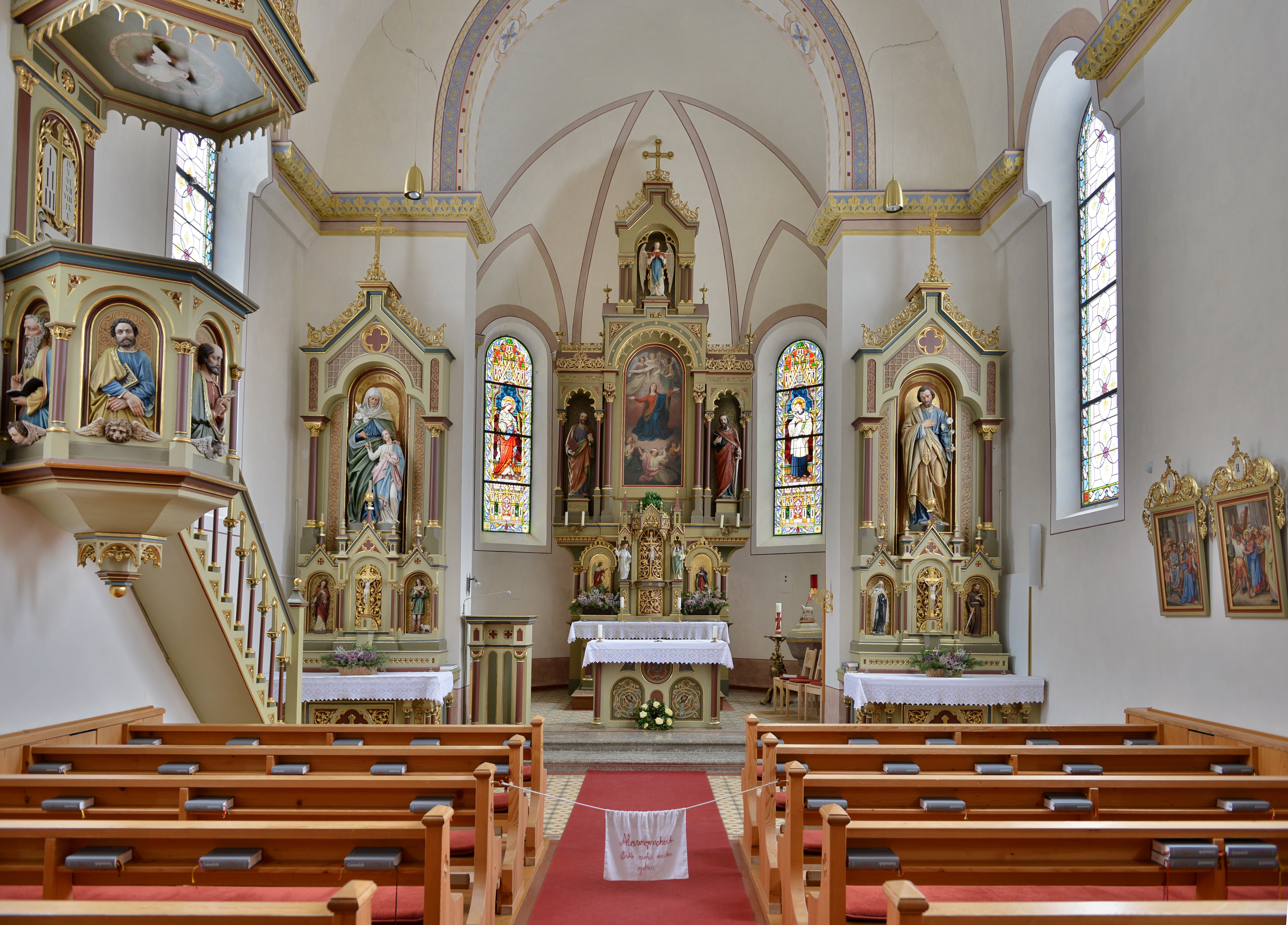 Pfarrkirche "Unsere Liebe Frau Mariä Himmelfahrt" von Schröcken im Bregenzerwald , Vorarlberg